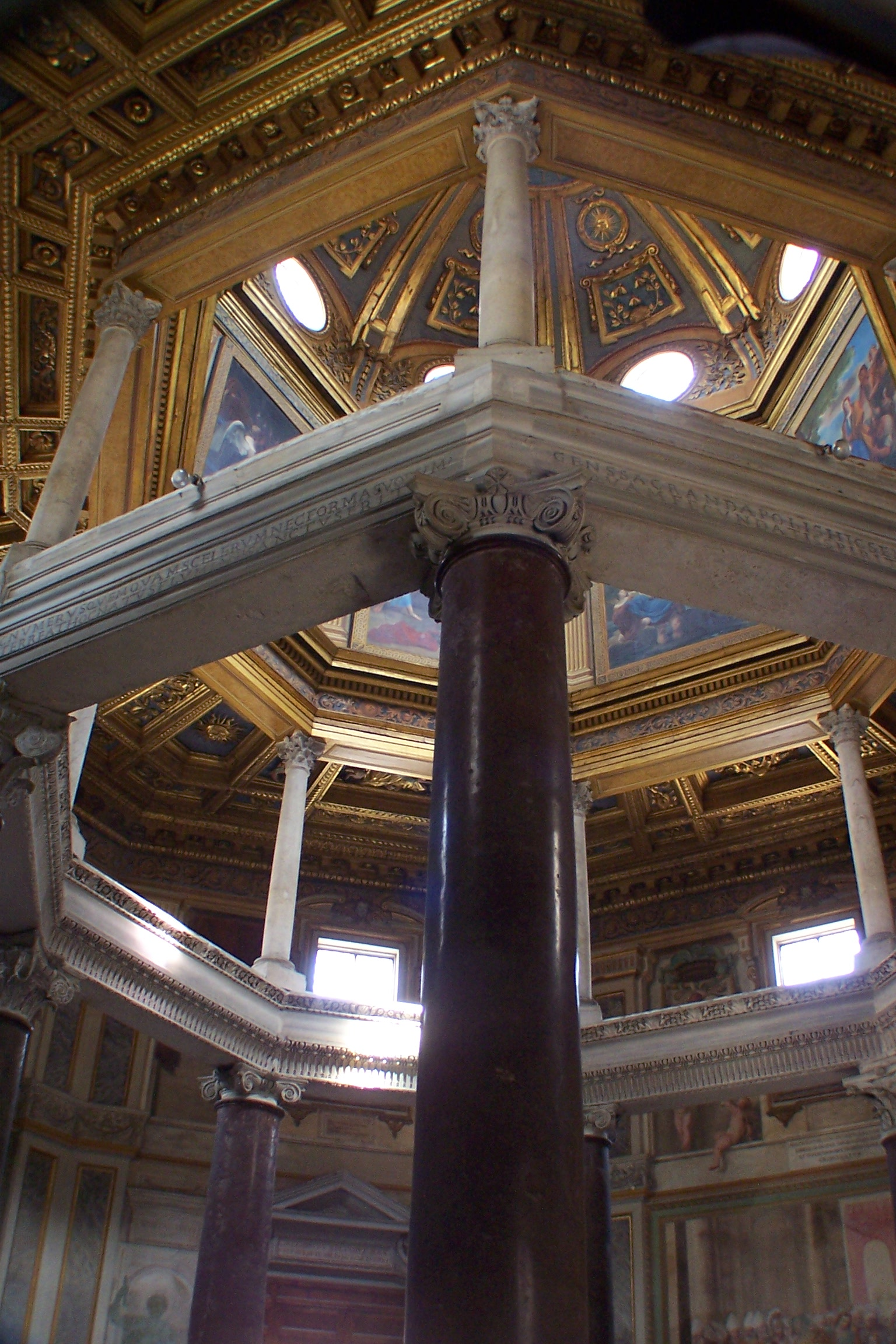 Roma, San Giovanni in Laterano, Battistero